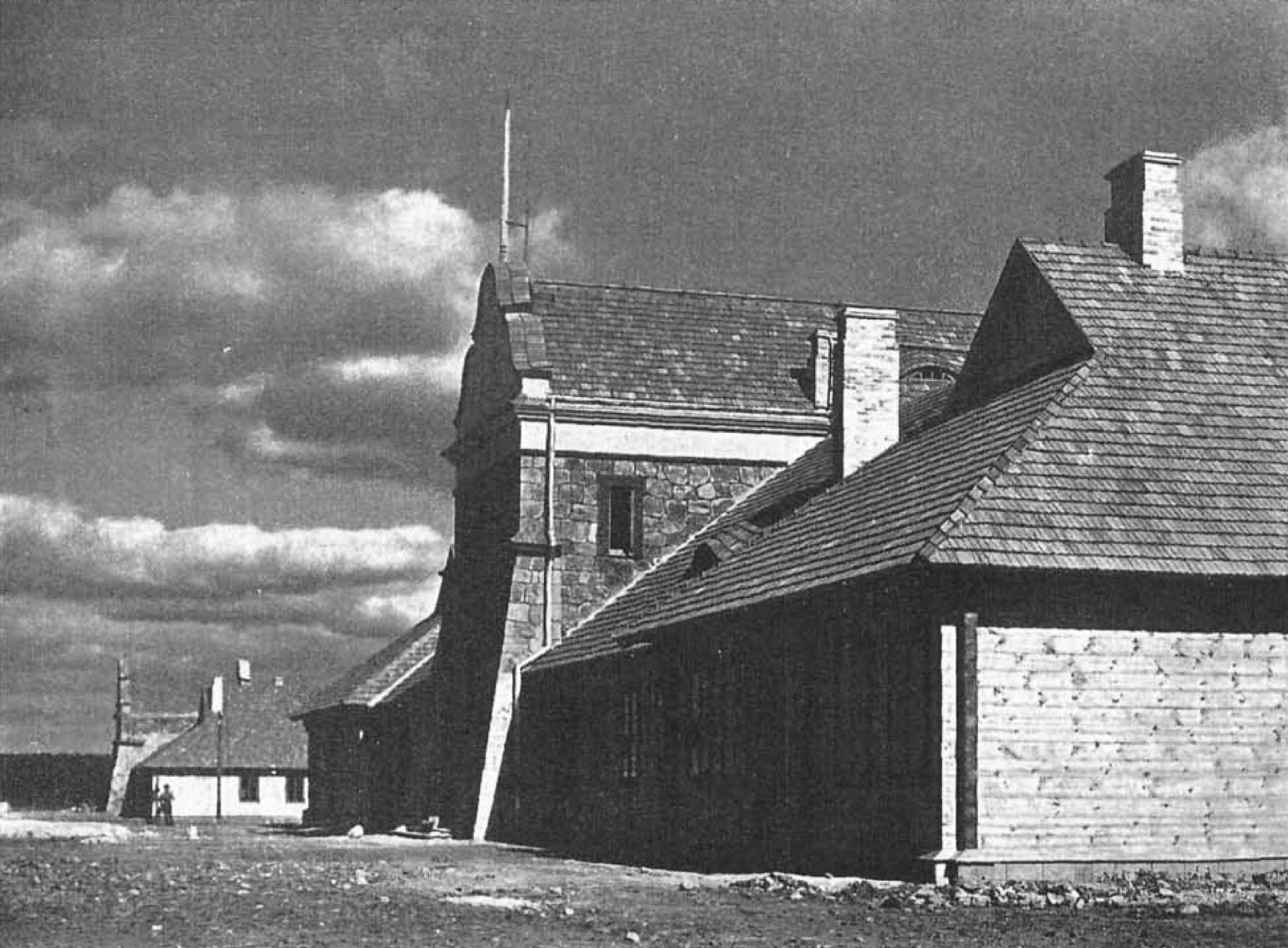 Беларуская (тарашкевіца): Клецак (Klecak), вуліца Кашарская (vulica Kašarskaja). Кашары